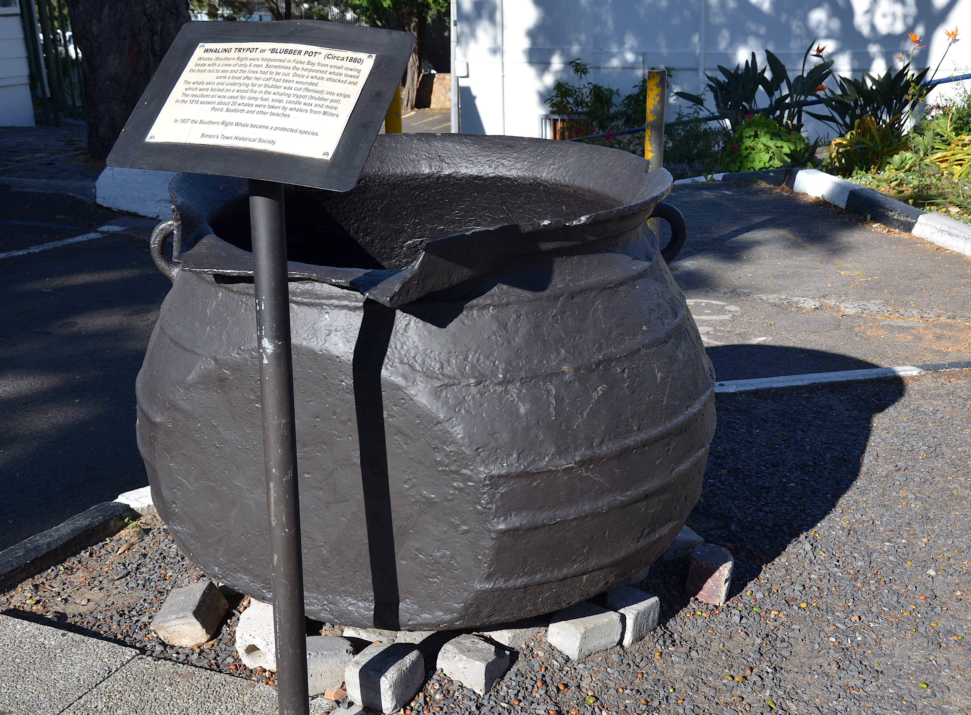 Wal Trypot (Blubber Pot) in Simon's Town in Südafrika